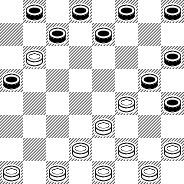 Кол — угловик